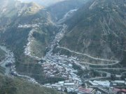 foto desde un cerro hacia este pueblo